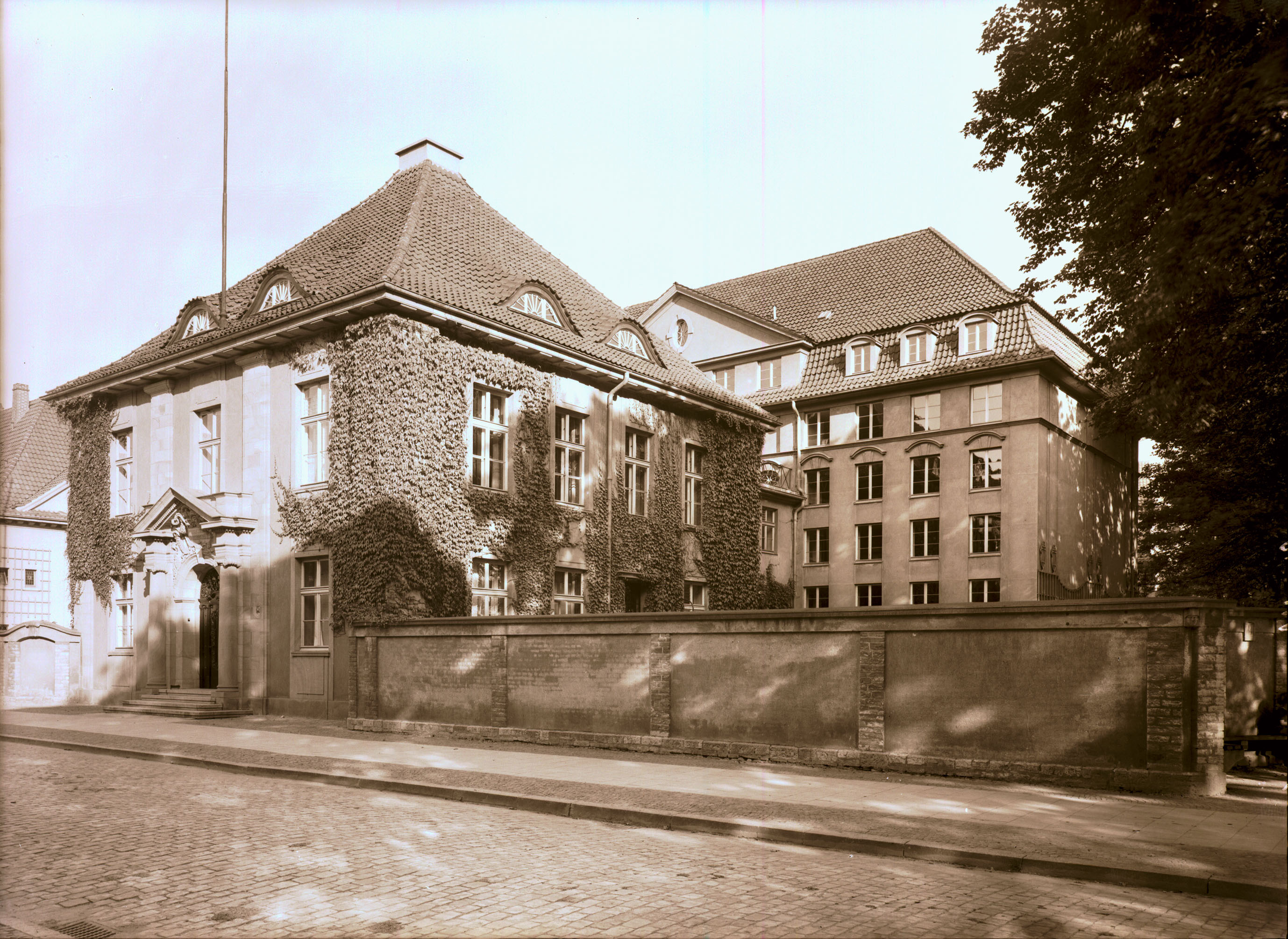 Ansicht des damaligen Staatsarchivs Osnabrück